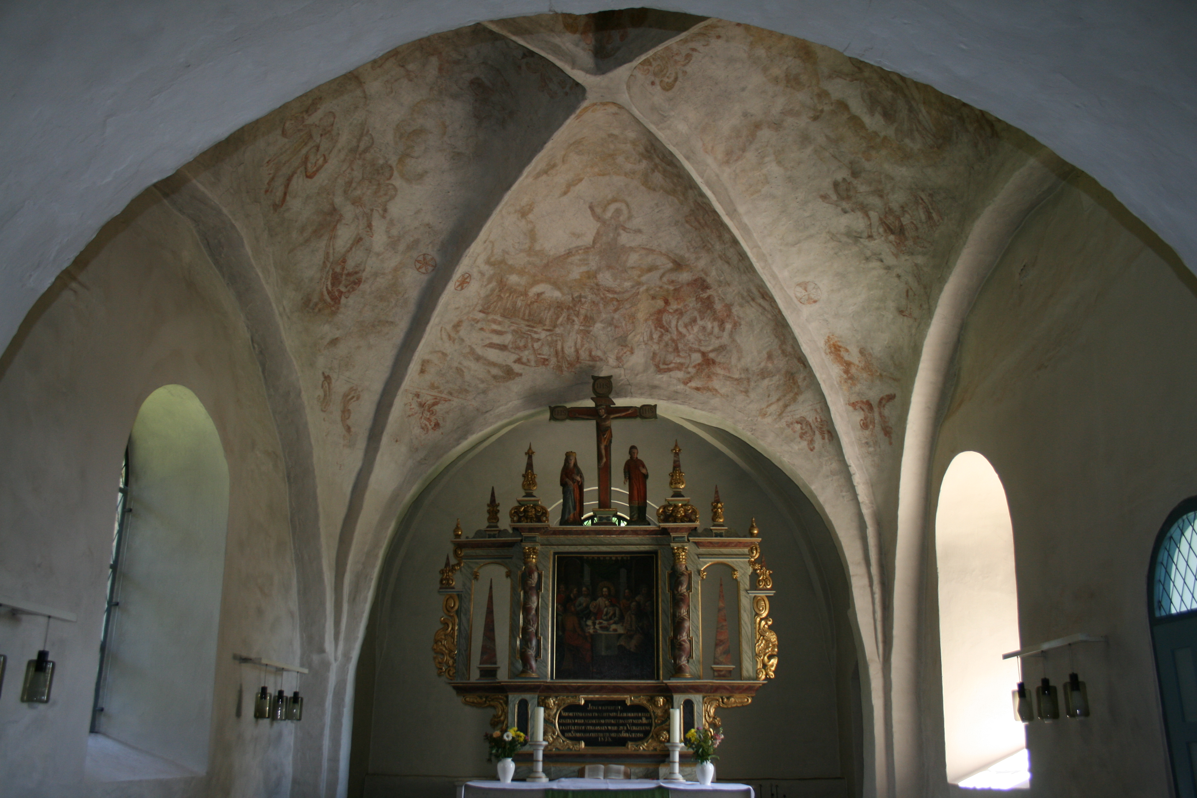 Altar und Deckenmalerei in der Laurentius-Kirche Kosel (Schleswig-Holstein)